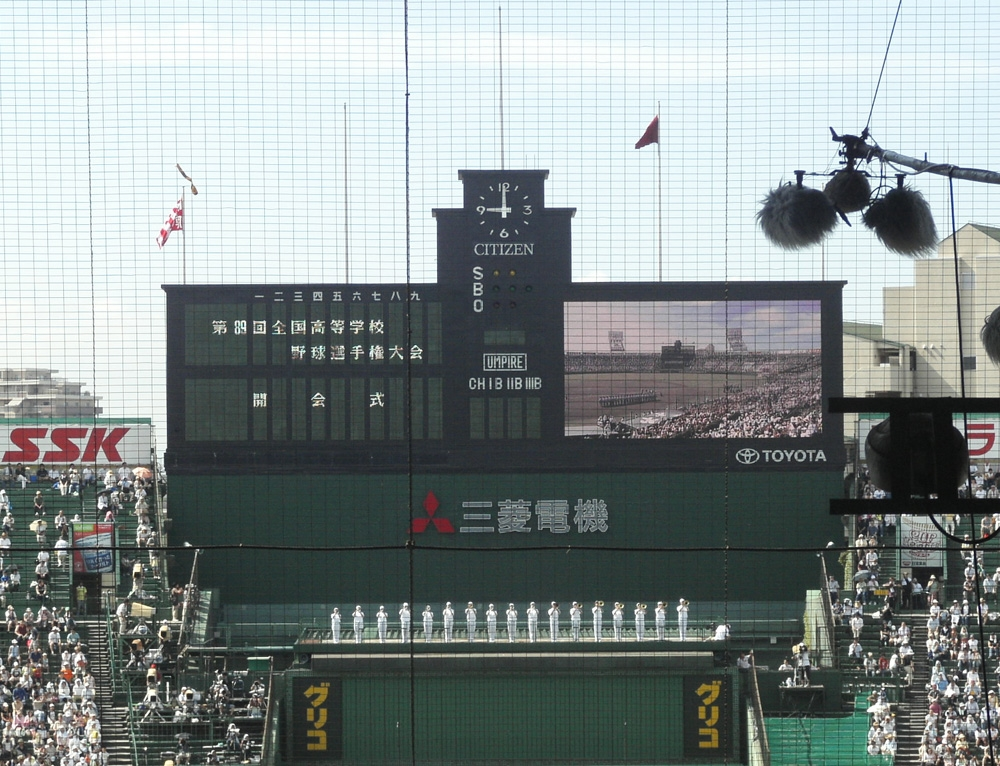 Hanshin Koshien Stadium